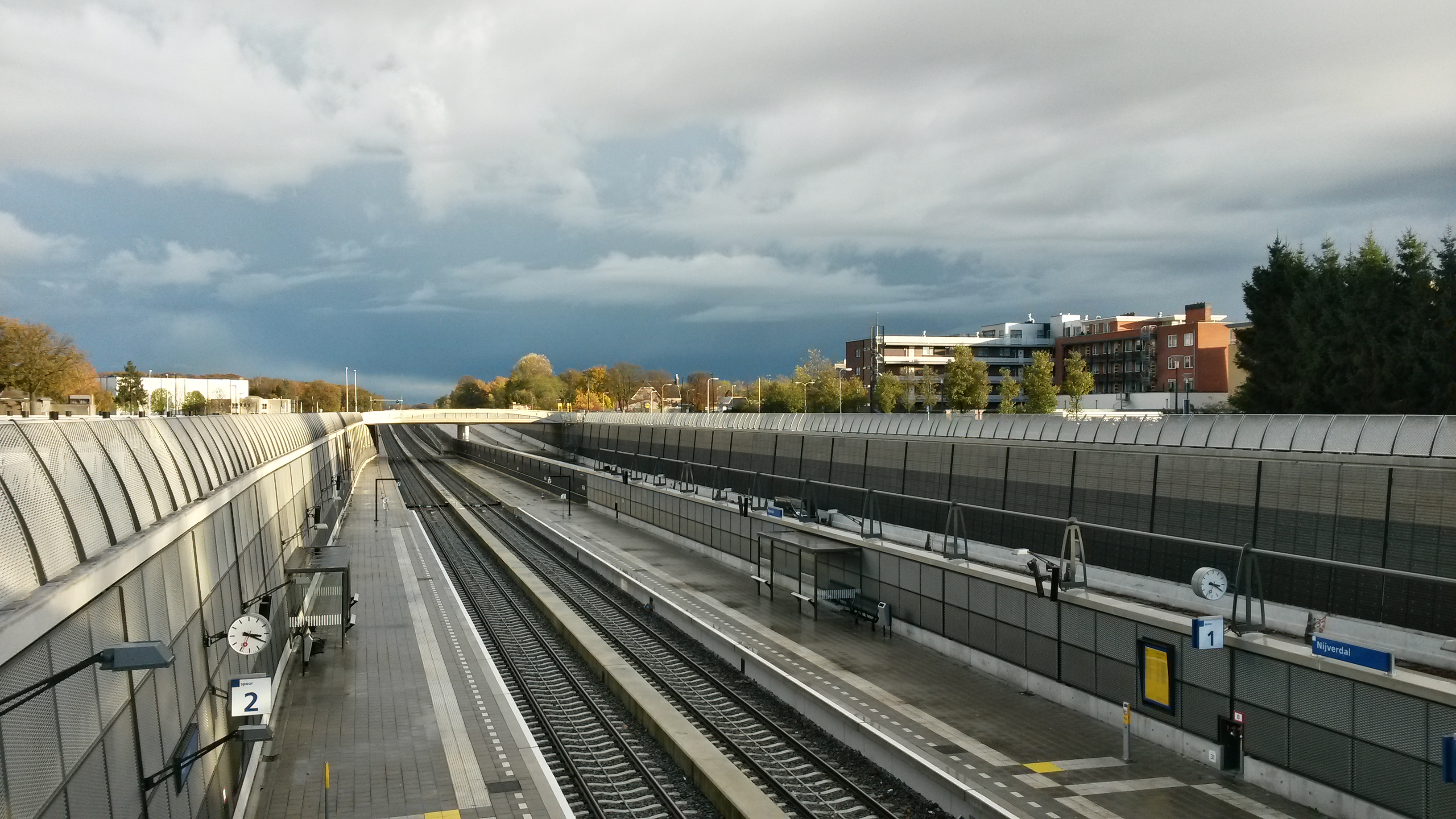 Het nieuwe station Nijverdal